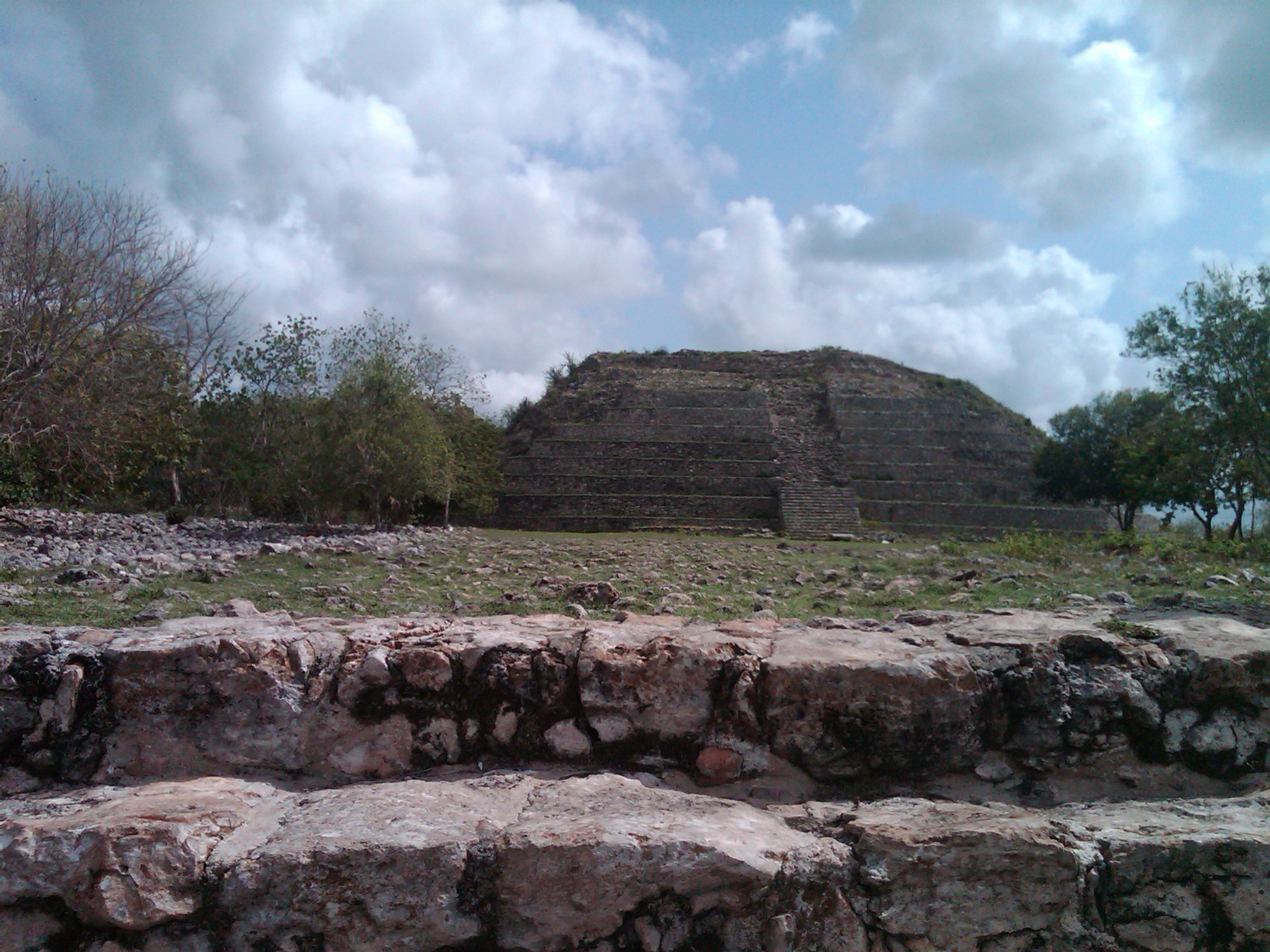 Izamal